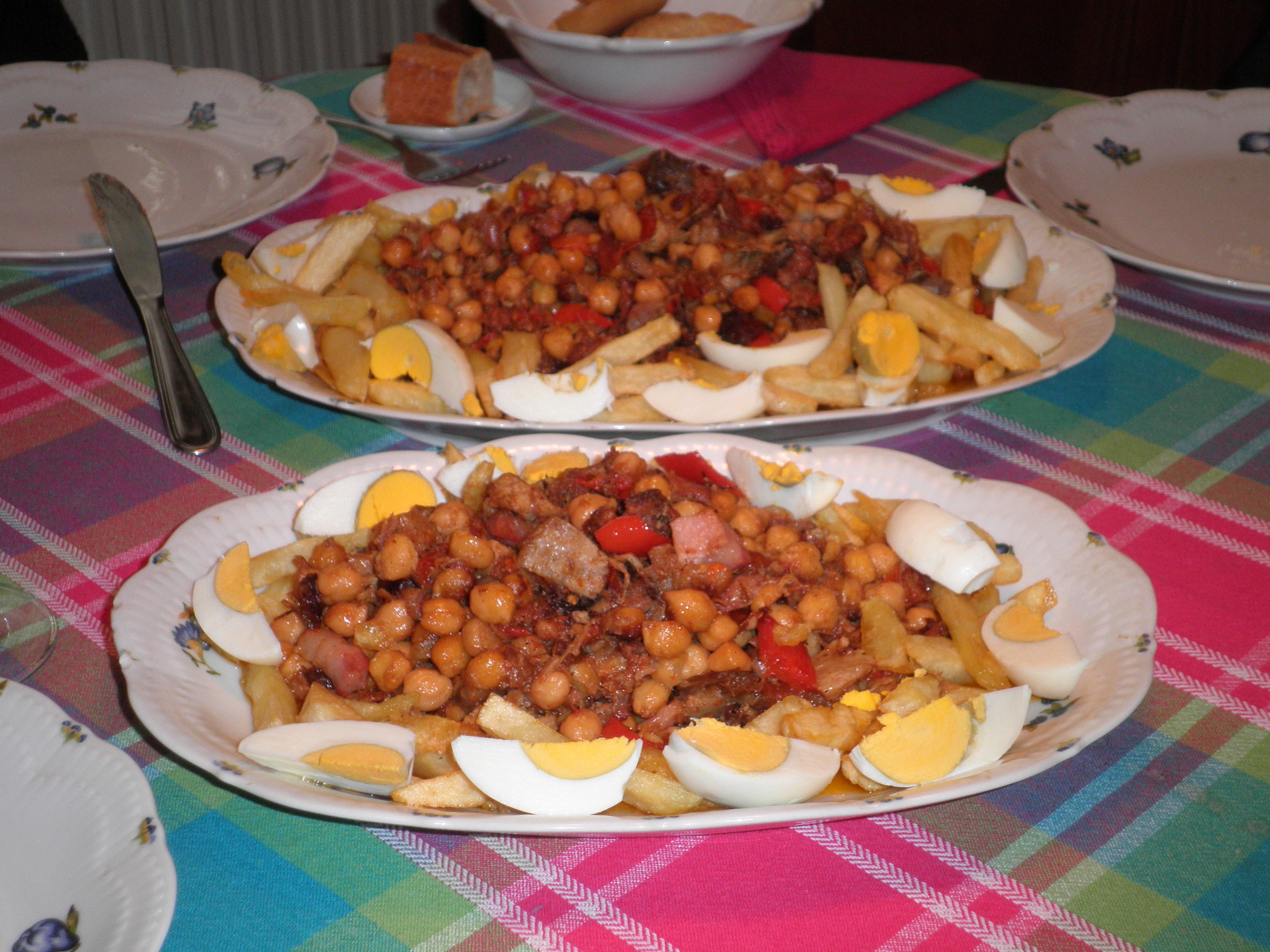 Roupa vella, unha maneira de aproveitar as sobras dun cocido.